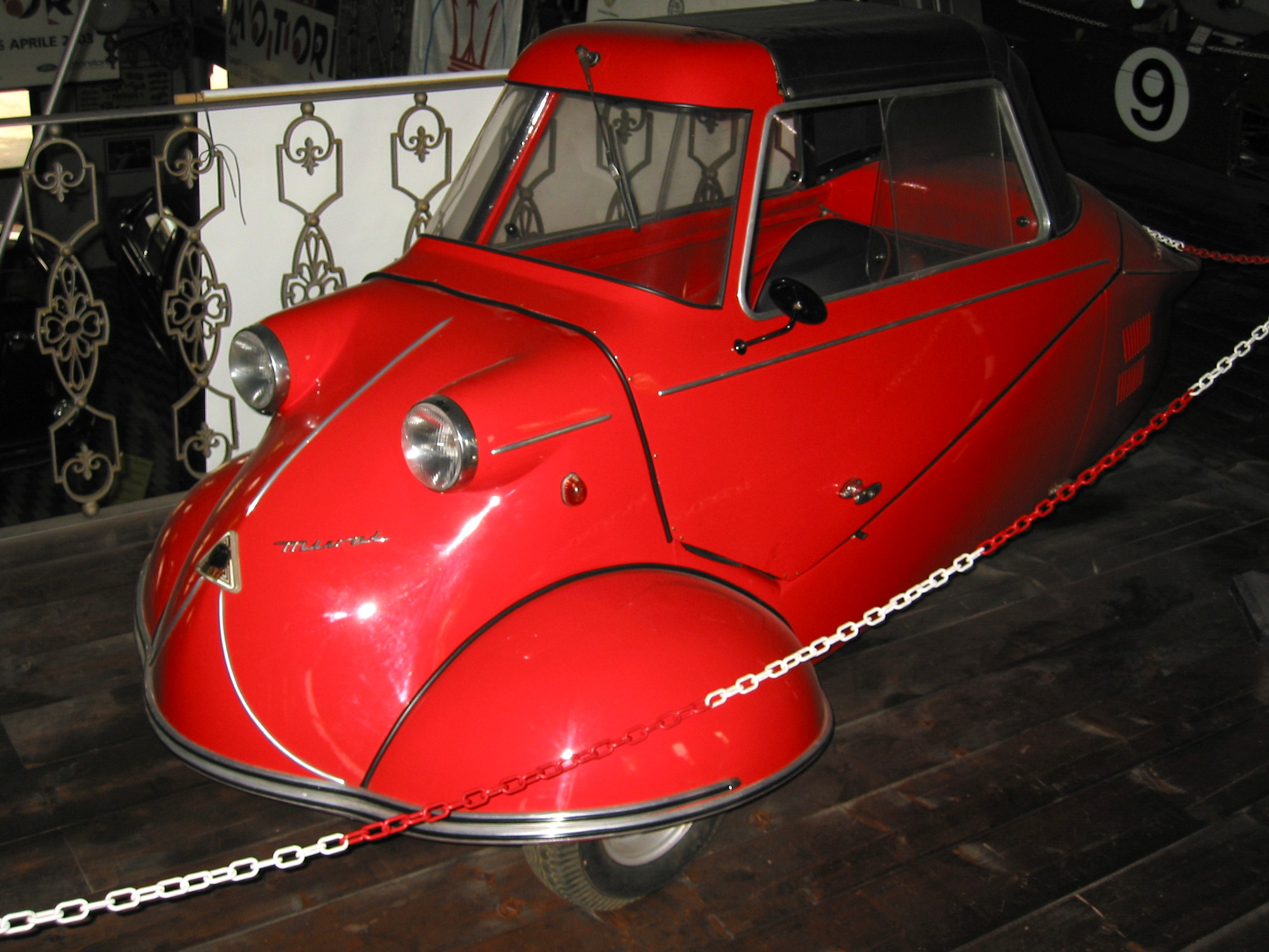 Mi-Val 1954-1955